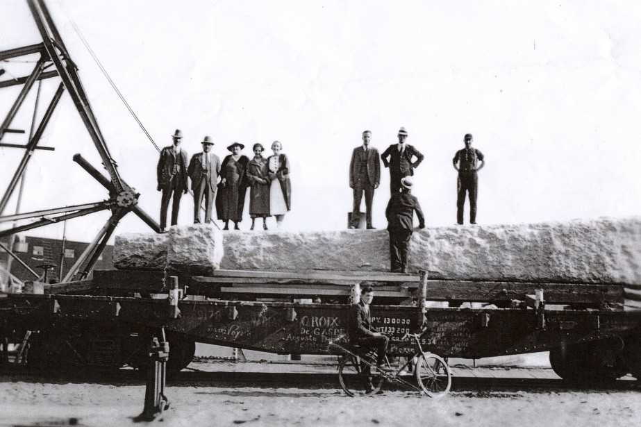 Croix de Gaspé: des origines reconnues À Rivière-à-Pierre, en 1934, l'imposante sculpture de granit est installée sur deux wagons et transportée par train jusqu'à Québec. « Dévoilée le 25 août 1934, la pièce de 42 tonnes a d'abord été transportée par chemin de fer jusqu'à Québec, puis par caboteur jusqu'à Gaspé. Du quai, la croix fut entraînée sur des rouleaux à l'aide de palans grâce à la force motrice de l'un des premiers tracteurs à être utilisé à Gaspé. » - lapresse.ca